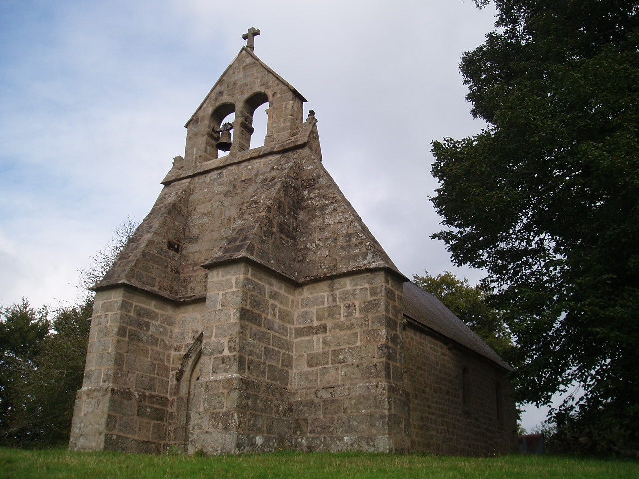 église